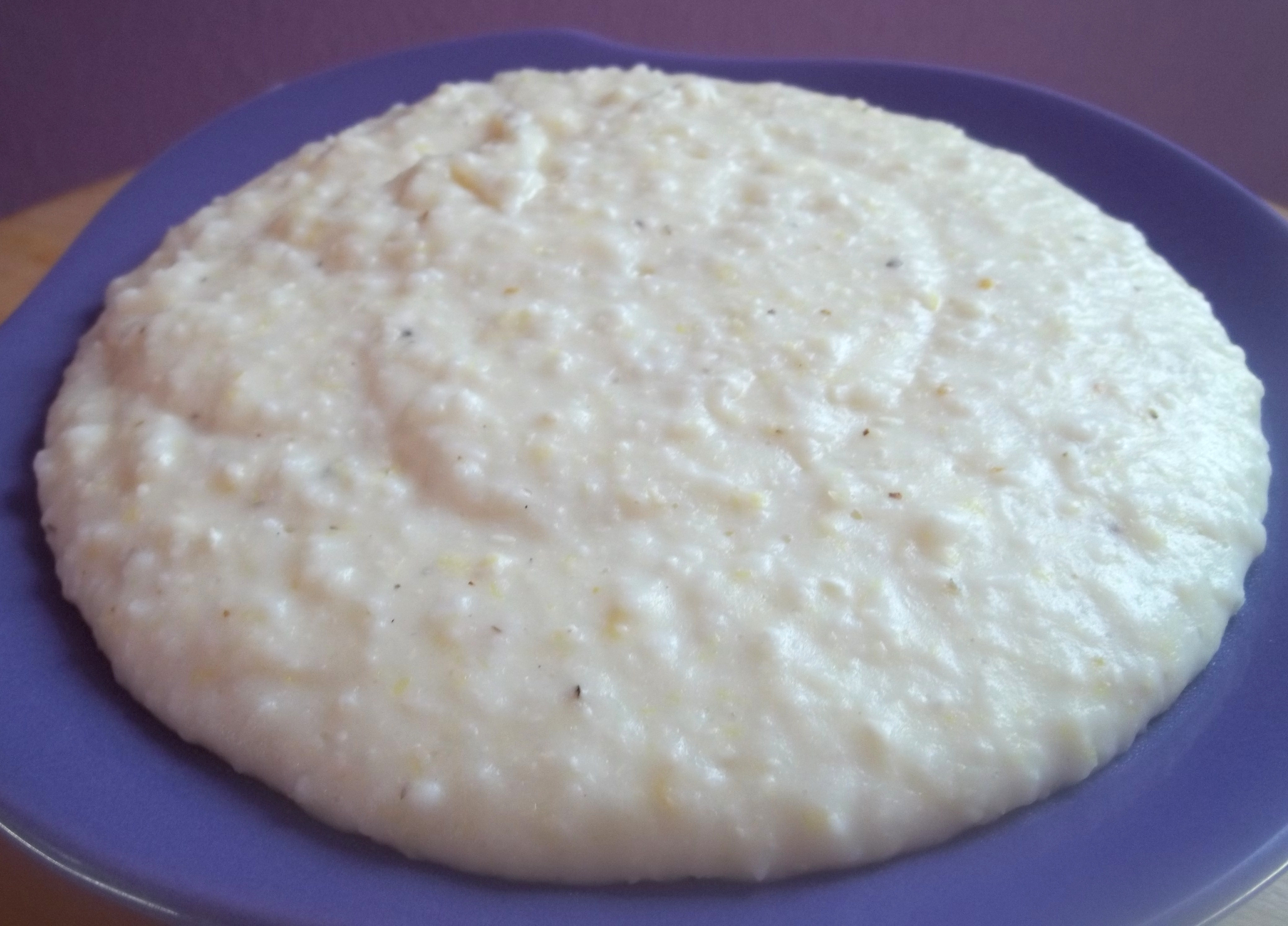 Эларджи, грузинское блюдо из кукурузной каши и сыра сулугуни